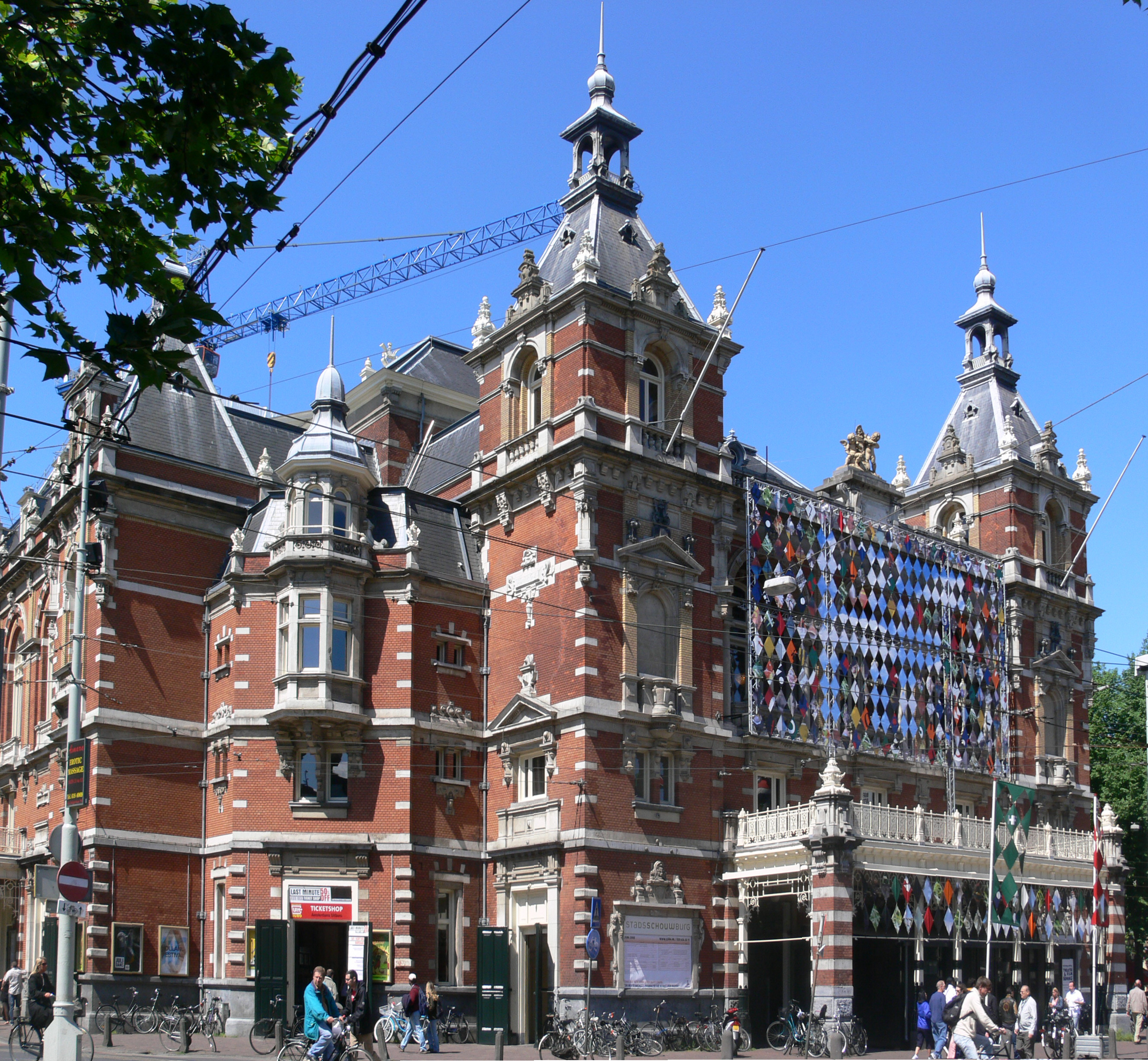 Stadsschouwburg, Leidesplein Amsterdam